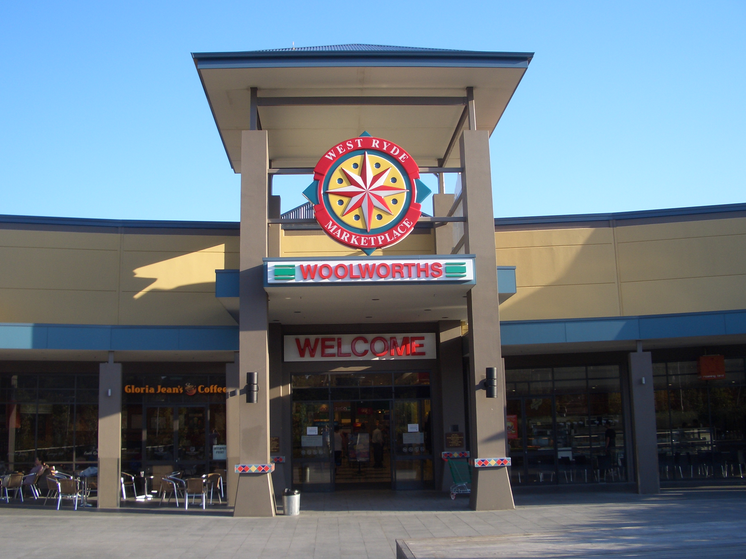 West Ryde Marketplace